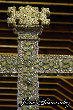 Cruz y peana de plata basiada y filigrana con cristales irisados. 1670 Catedral de Nuestra Señora de los Remedios. San Cristobal de La Laguna